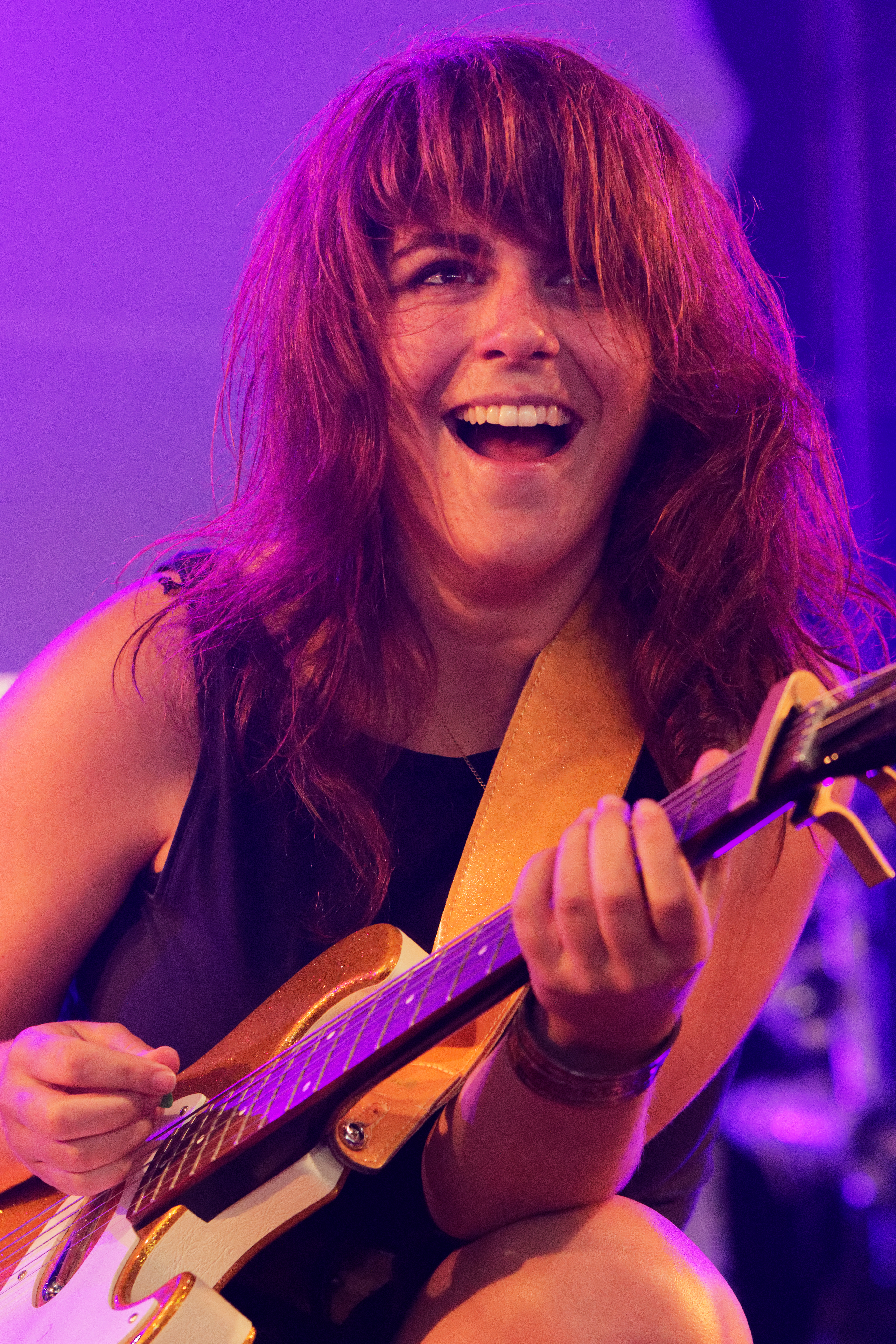 Lisa LeBlanc en concert sous le chapiteau de Seb lors du festival du Bout du Monde 2017 à Crozon dans le Finistère (France).